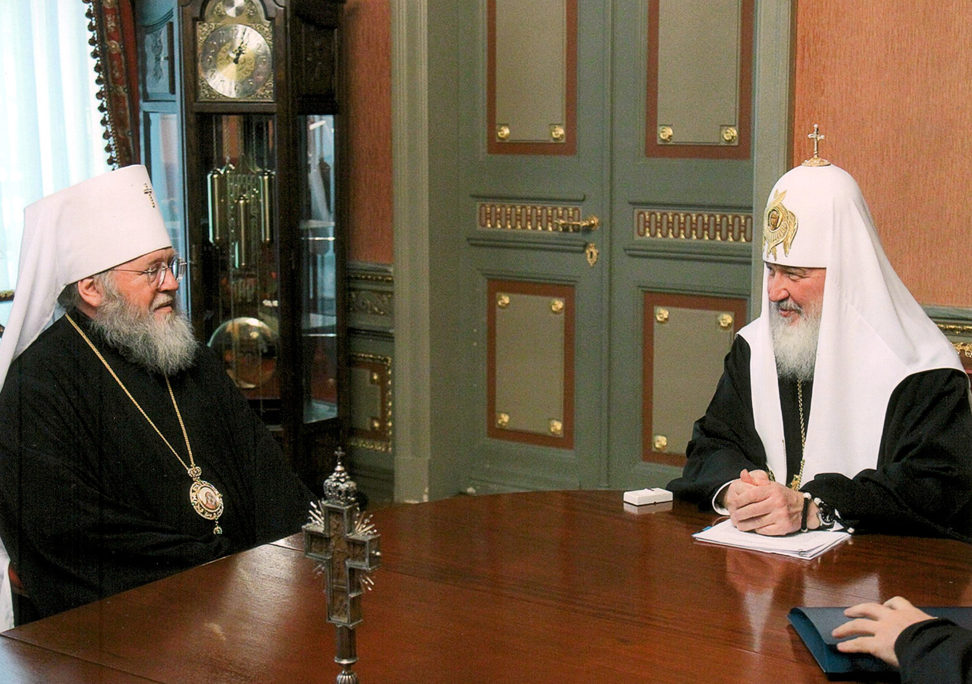 30 сентября 2010 года в Москве в рабочей Патриаршей резиденции в Чистом переулке состоялась встреча Преосвященного Митрополита Восточно-Американского и Нью-Йоркского Илариона, Первоиерарха Русской Зарубежной Церкви со Святейшим Патриархом Московским и всея Руси Кириллом. Во встрече приняли участие Преосвященный митрополит Волоколамский Иларион, председатель Отдела внешних церковных связей, священник Максим Массалитин, настоятель храма Святого Архангела Михаила в Каннах и председатель его приходской ассоциации, попечители ассоциации: протоиерей Серафим Ган, протоиерей Петр Холодный и В.А. Шевчук, а также сотрудники Управления Московской Патриархии по зарубежным учреждениям. В ходе беседы с Его Cвятейшеством обсуждались многие вопросы из жизни Русской Православной Церкви Заграницей. В частности был затронут вопрос комплексной реставрации Михаило-Архангельского храма в Каннах. Проведение комплексной реставрации требует привлечения серьезных средств из России. В связи с этим, Святейший Патриарх Кирилл принял предложение Первоиерарха Русской Зарубежной Церкви стать почетным председателем попечительского совета программы реставрации и поддержки Михаило-Архангельского храма.